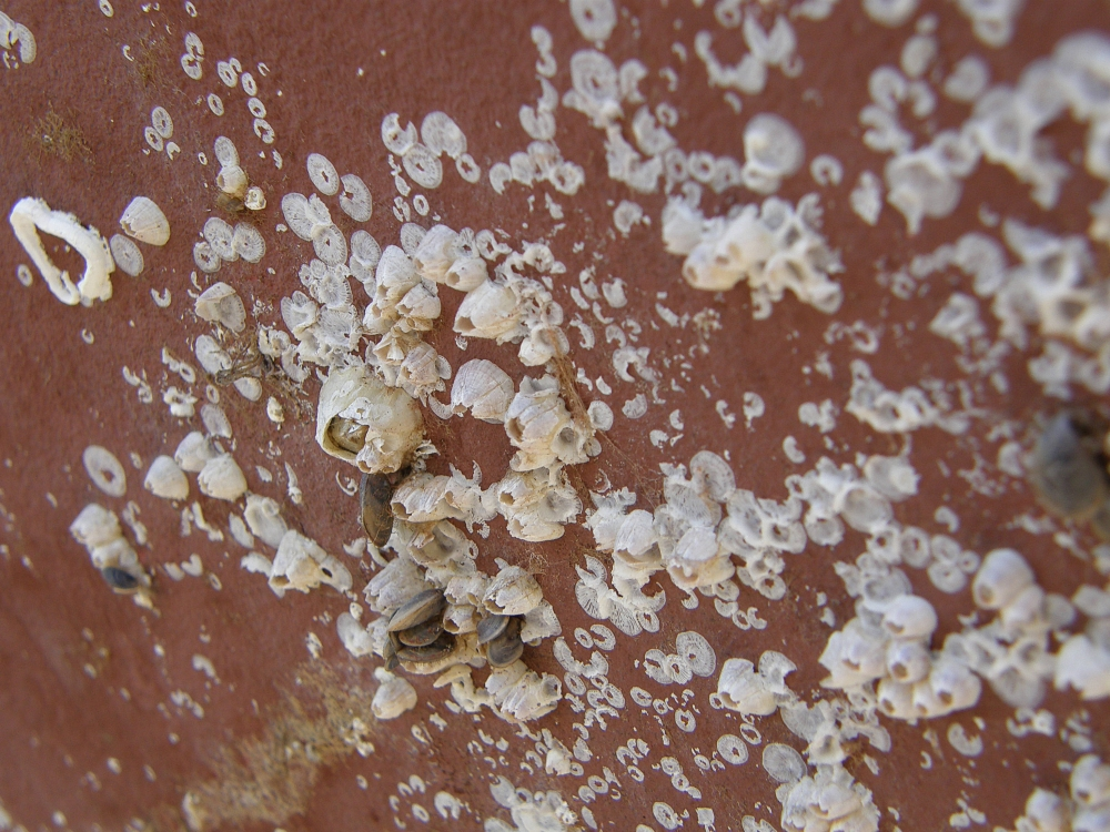 kleine Seepocken an einer Jacht